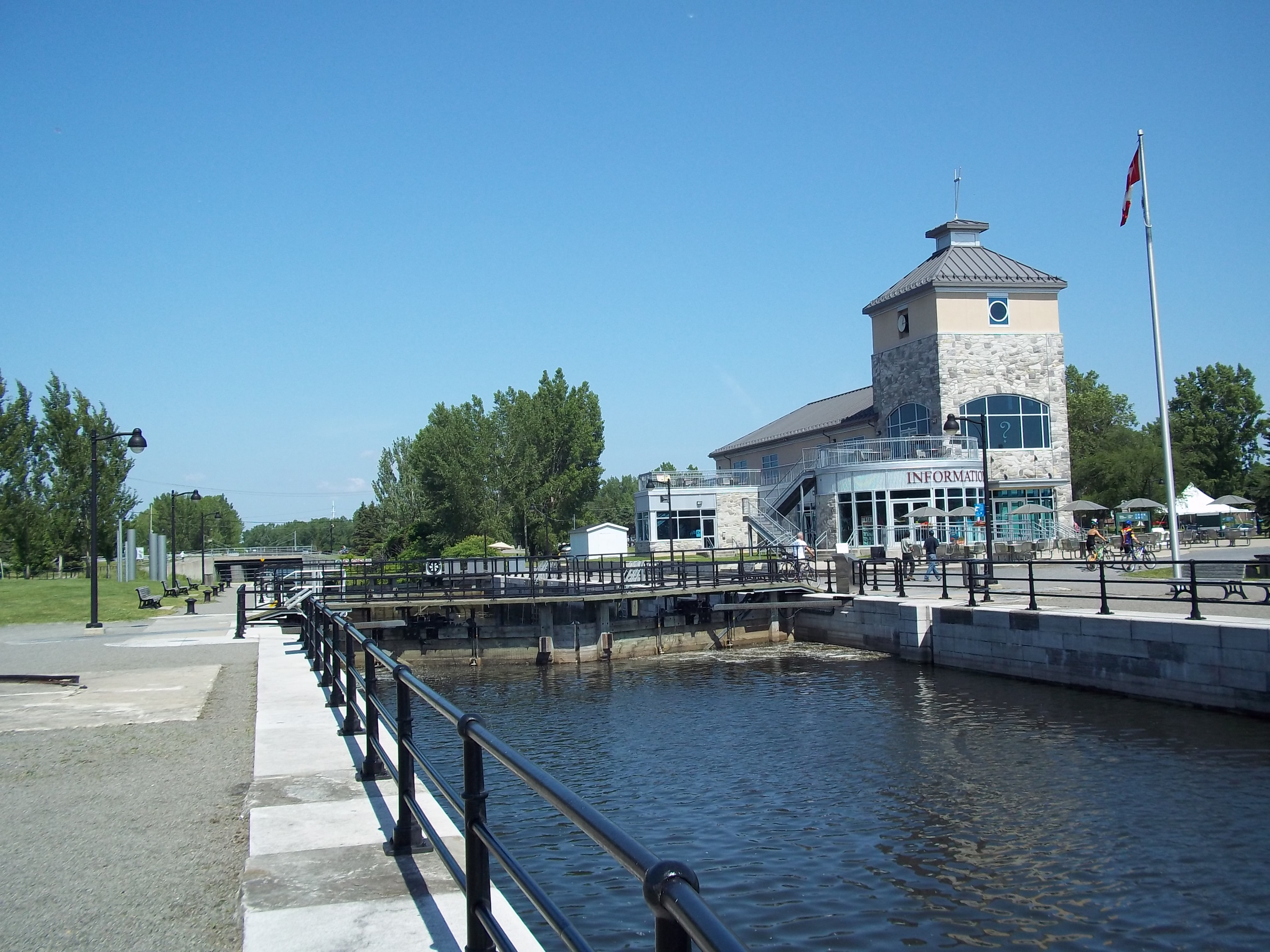 Centre d'interprétation des écluses, Lachine